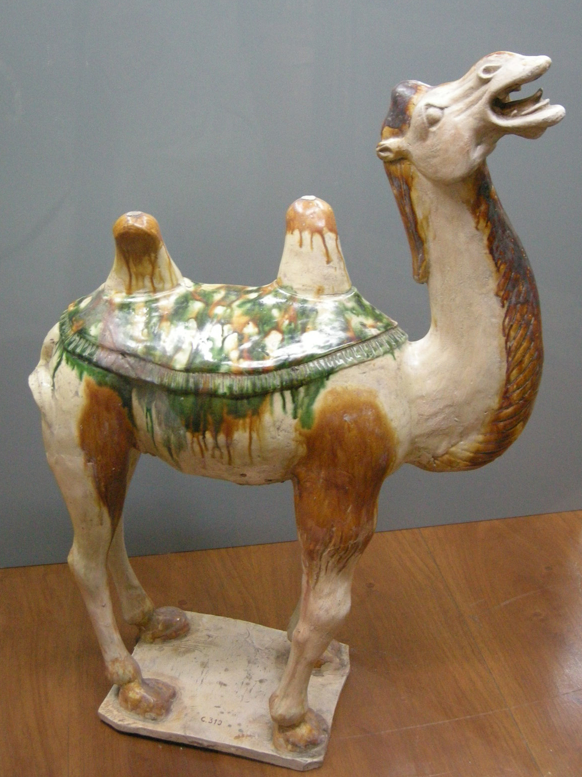 C. sf., cammello battriano, uso funerario, dinastia tang